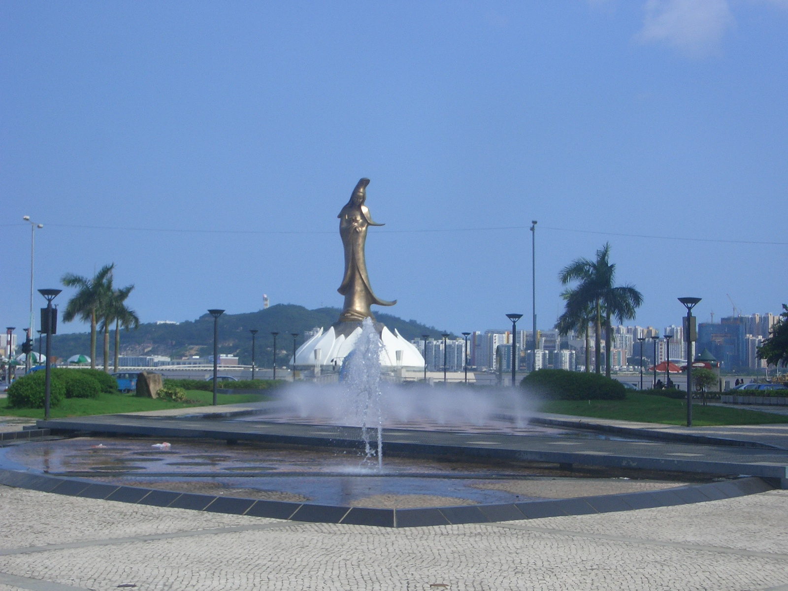 宋玉生公園與觀音蓮花苑(photo taken by 9old9)